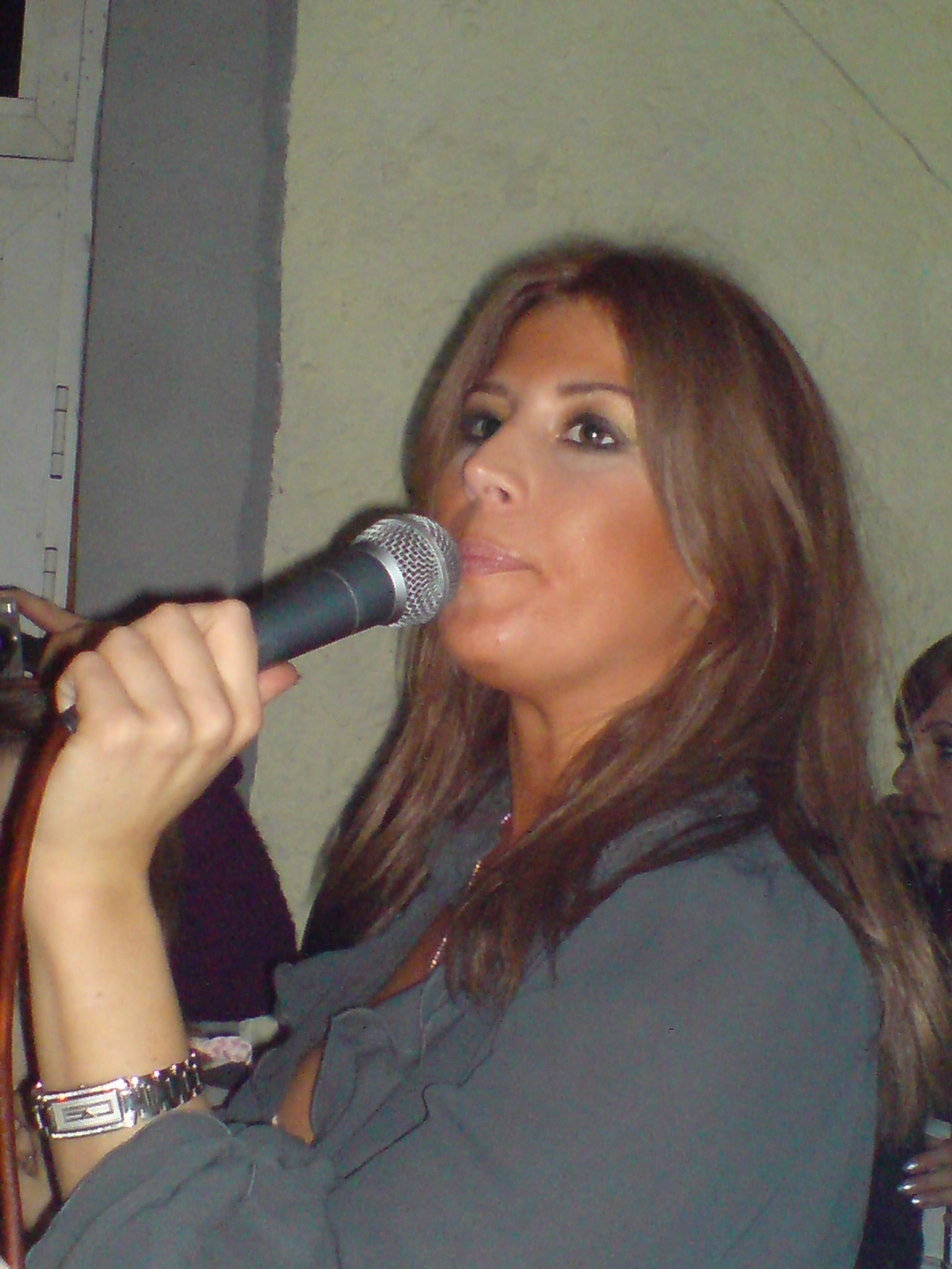 Ена Попов 2008. године. Ја, Mstudiodf, сам аутор фотографије и предајем је у јавно власништво.